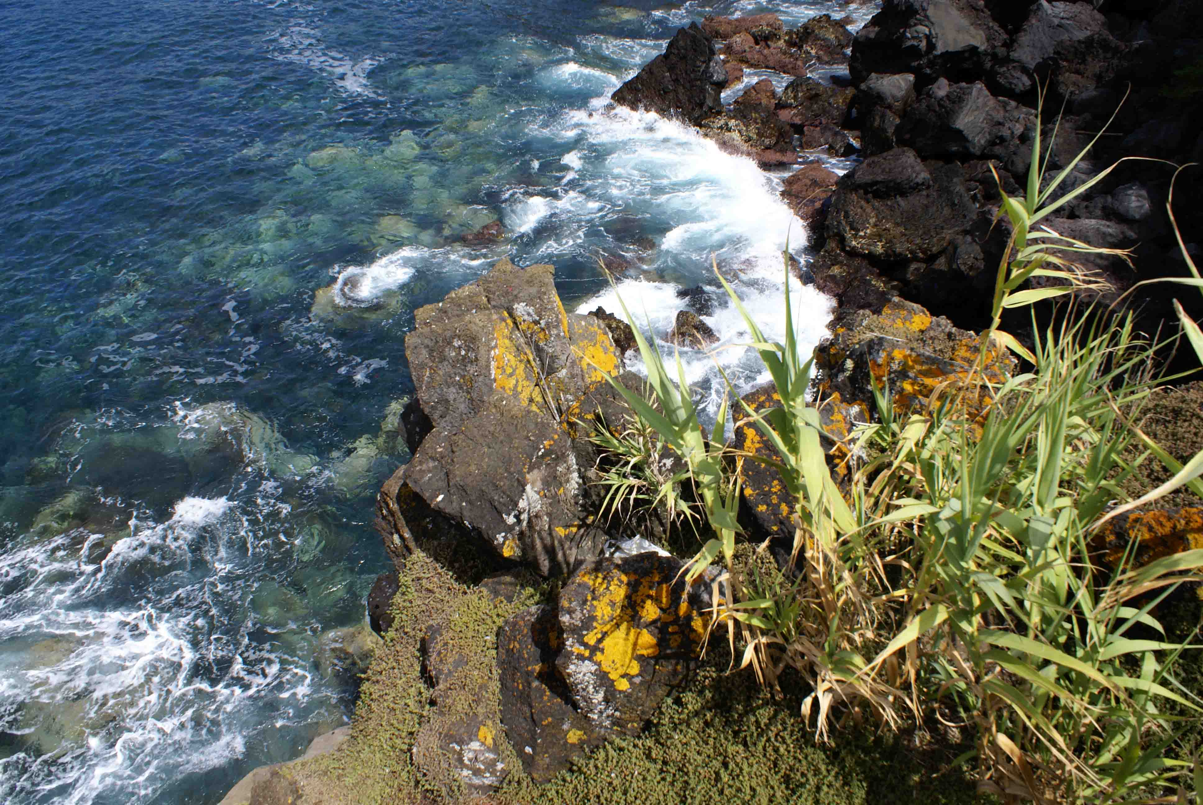 Arundo donax vulgo Cana, Musgos e urze na Costa da Baía da Villa Maria, ilha Terceira, Açores, Portugal